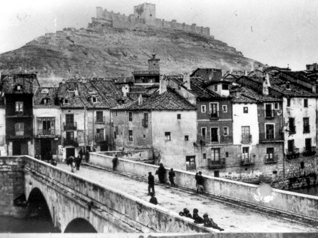 Vista panorámica - Peñafiel (Valladolid) - Cuaderno. Álbum de Valladolid - Fotografía 42 x 60 B/N